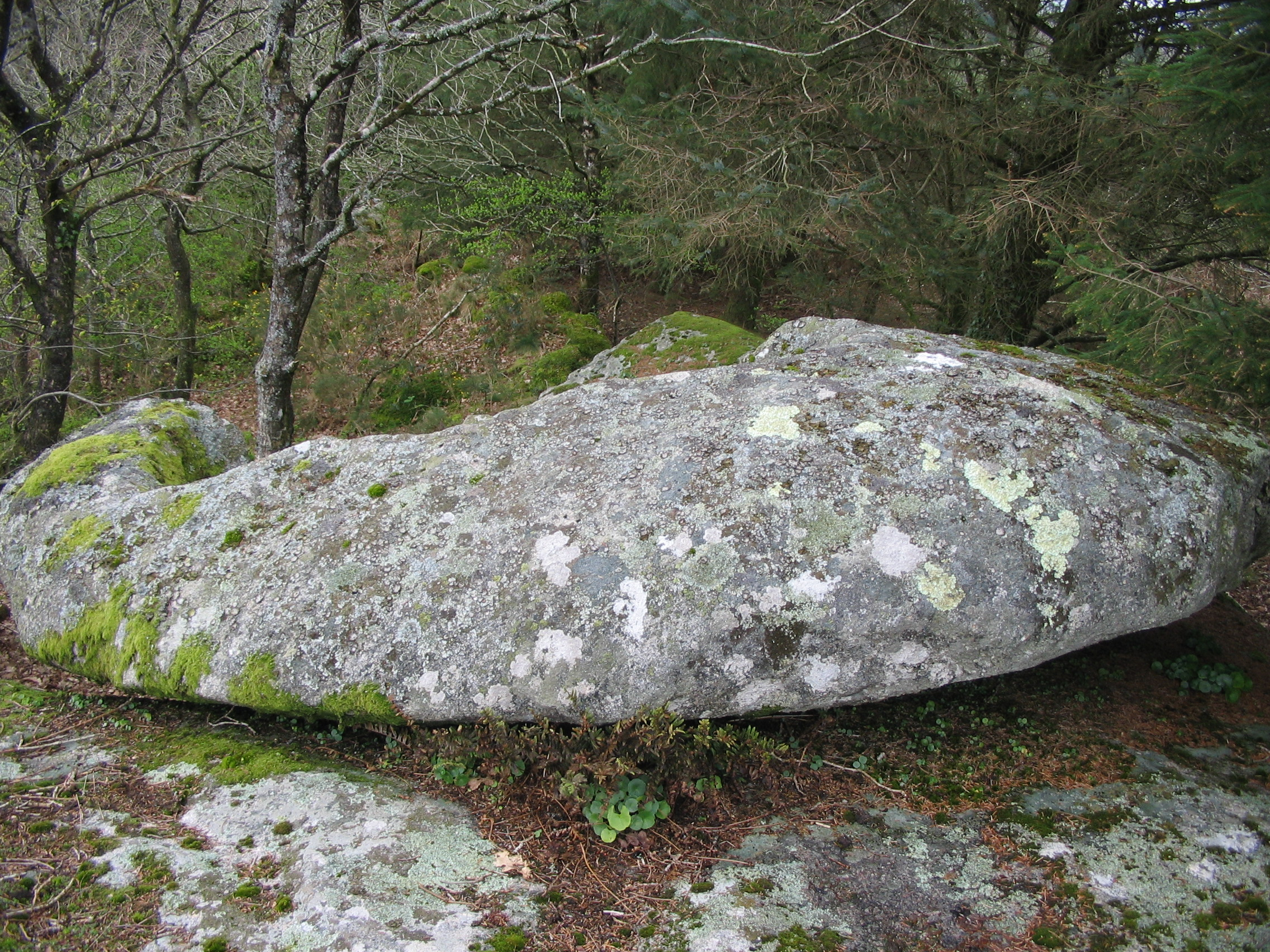 lit de Saint-Eneour, Plounéour-Menez, hoël gwazgwenn.